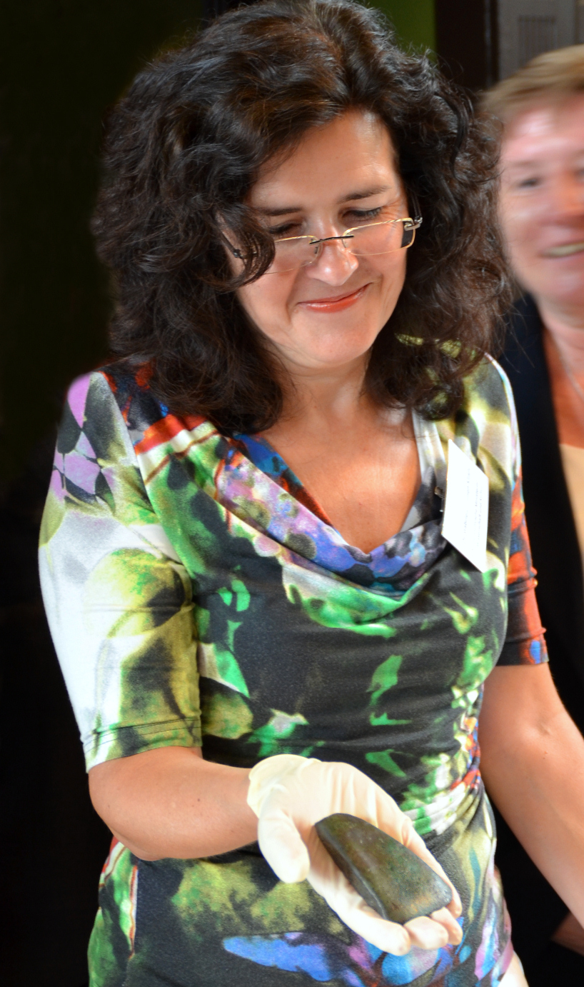 Präsentation des Kupferbeils von Steinbergen durch die niedersächsische Ministerin für Wissenschaft und Kultur Gabriele Heinen-Kljajić